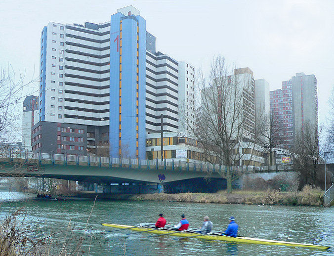 Ihmezentrum und Ihme